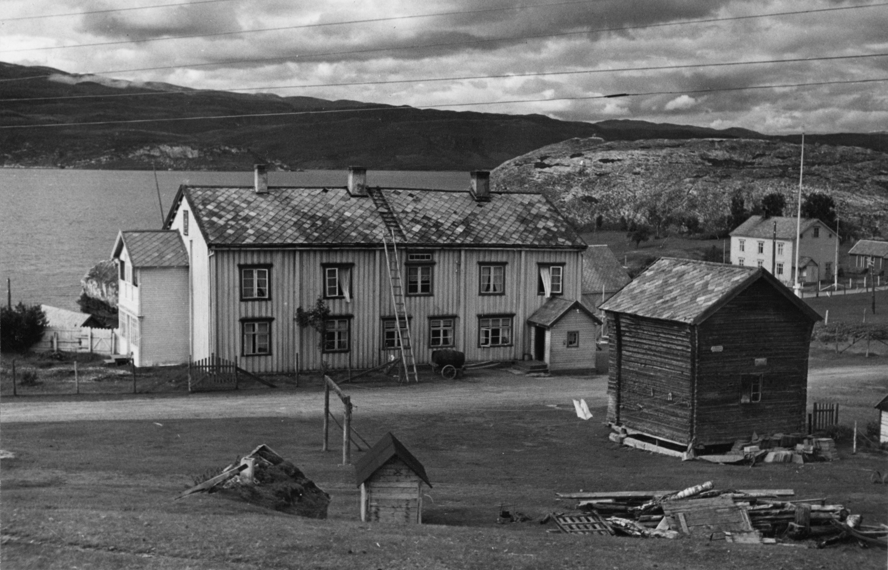 Bossekop handelssted, Finnmark This image on crowdsourcing geotagging platform Fotodugnad